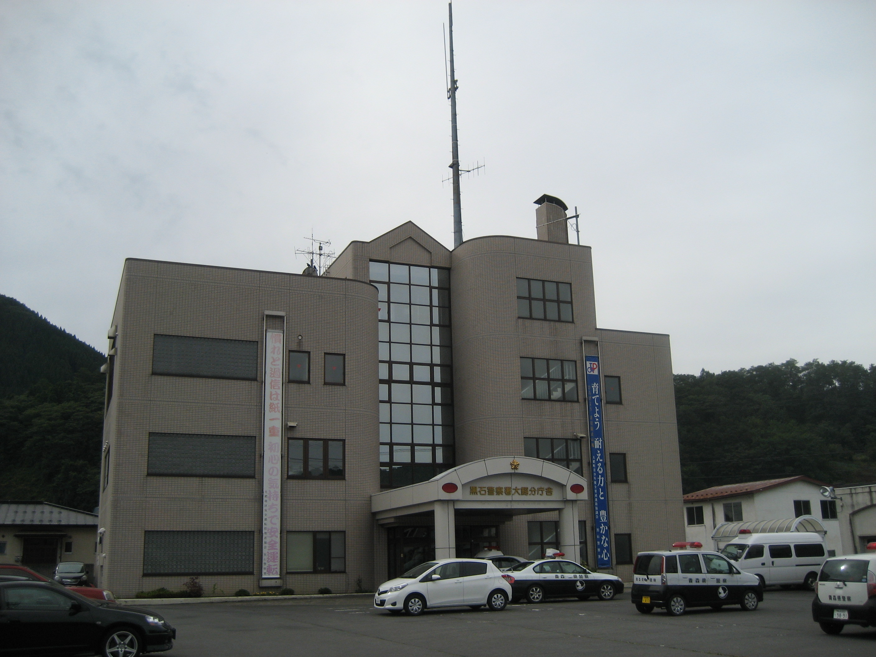 黒石警察署大鰐分庁舎（旧大鰐警察署）